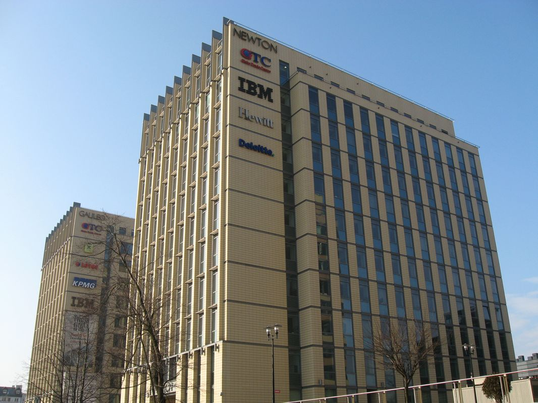 Biurowiec Newton, Kraków ul. Armii Krajowej 18